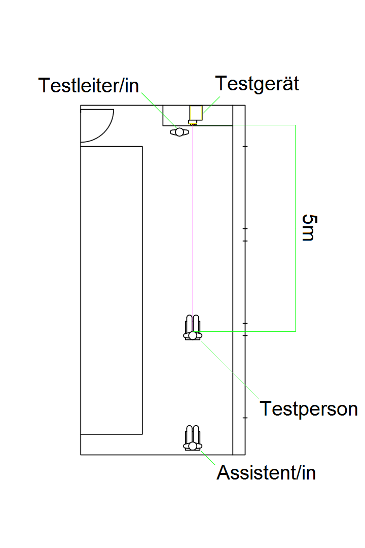 Hierbei handelt es sich um einen ungefähren Grundriss der Räumlichkeiten beim DLR in Köln, in denen der Lanterntest durchgeführt wird. Er wurde mit AutoCAD 2016 und Paint erstellt.